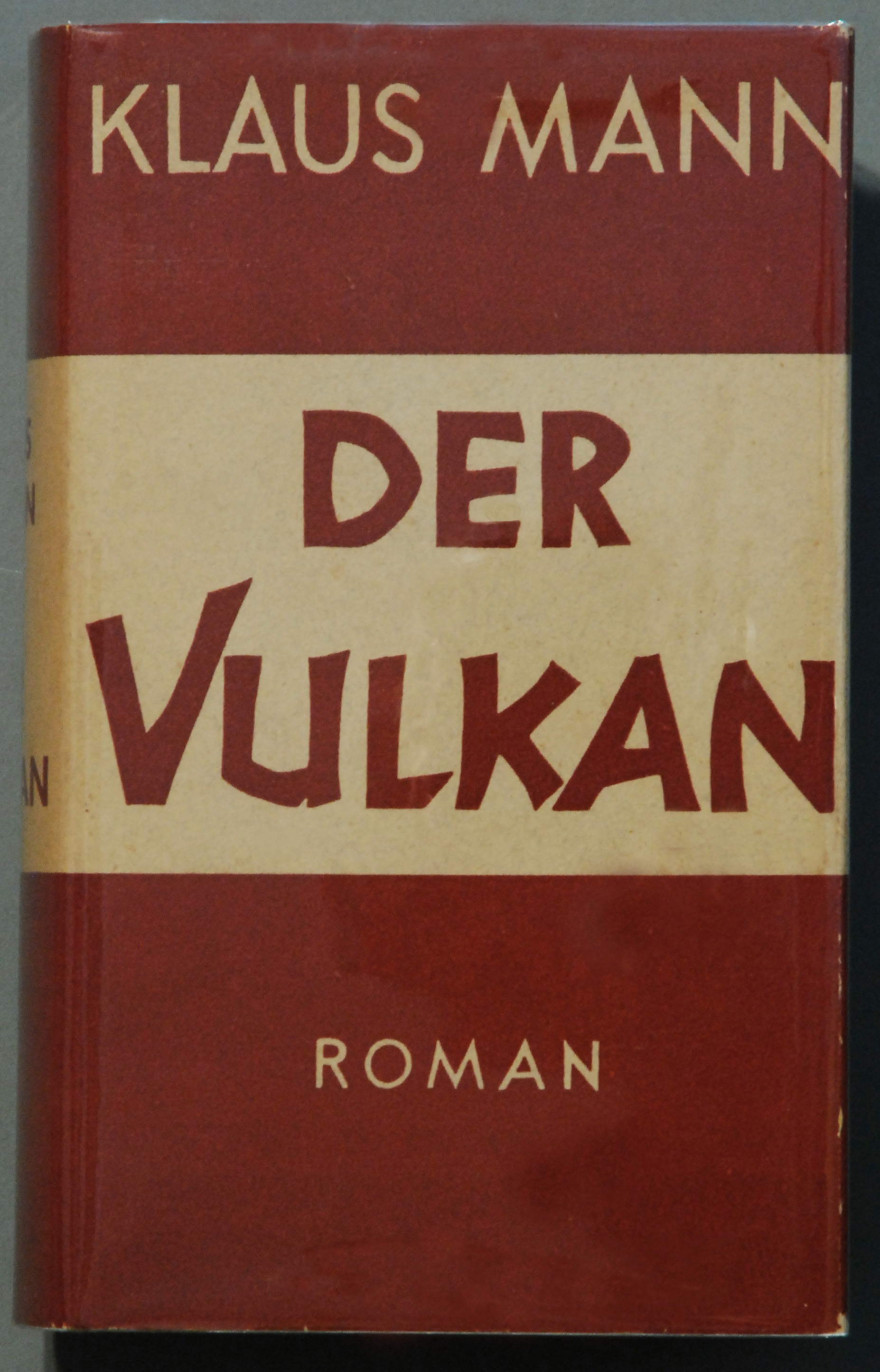 Mann, Klaus: Der Vulkan. Roman unter Emigranten. Amsterdam: Querido 1939, 721 S. Original-Verlagsumschlag der Erstausgabe, Wilpert/Gühring² 21. Sammlung H.-P.Haack